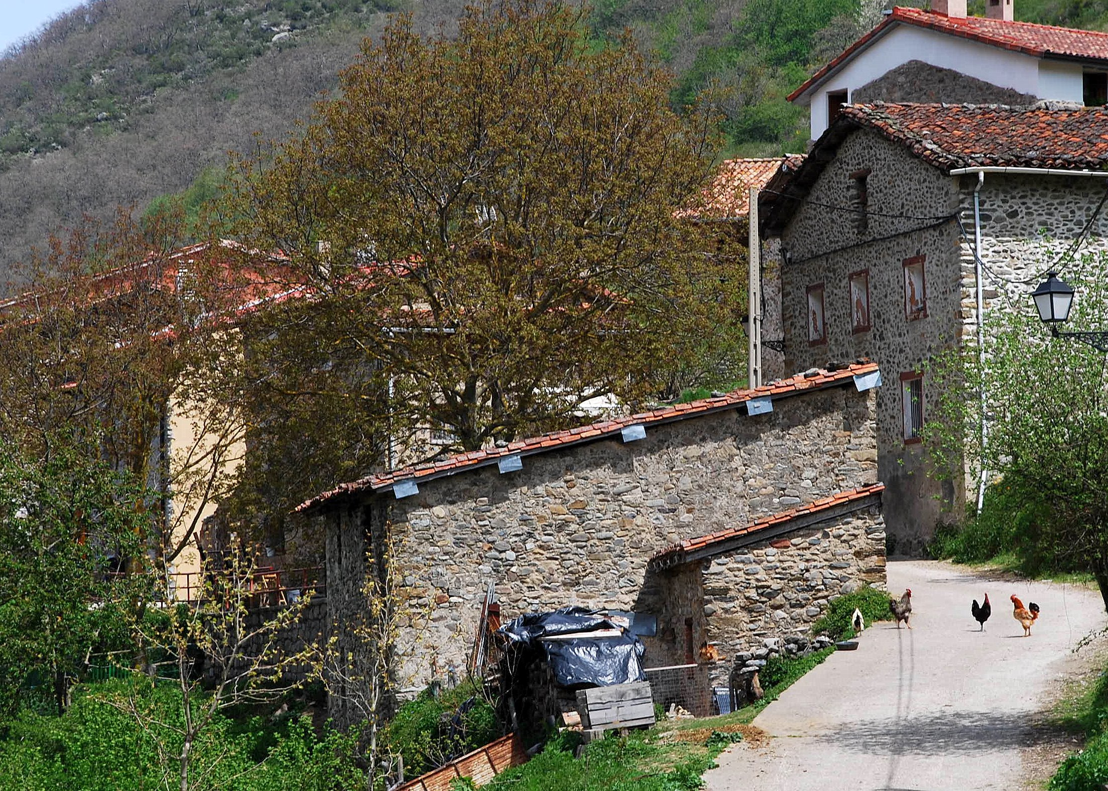 Azárrulla